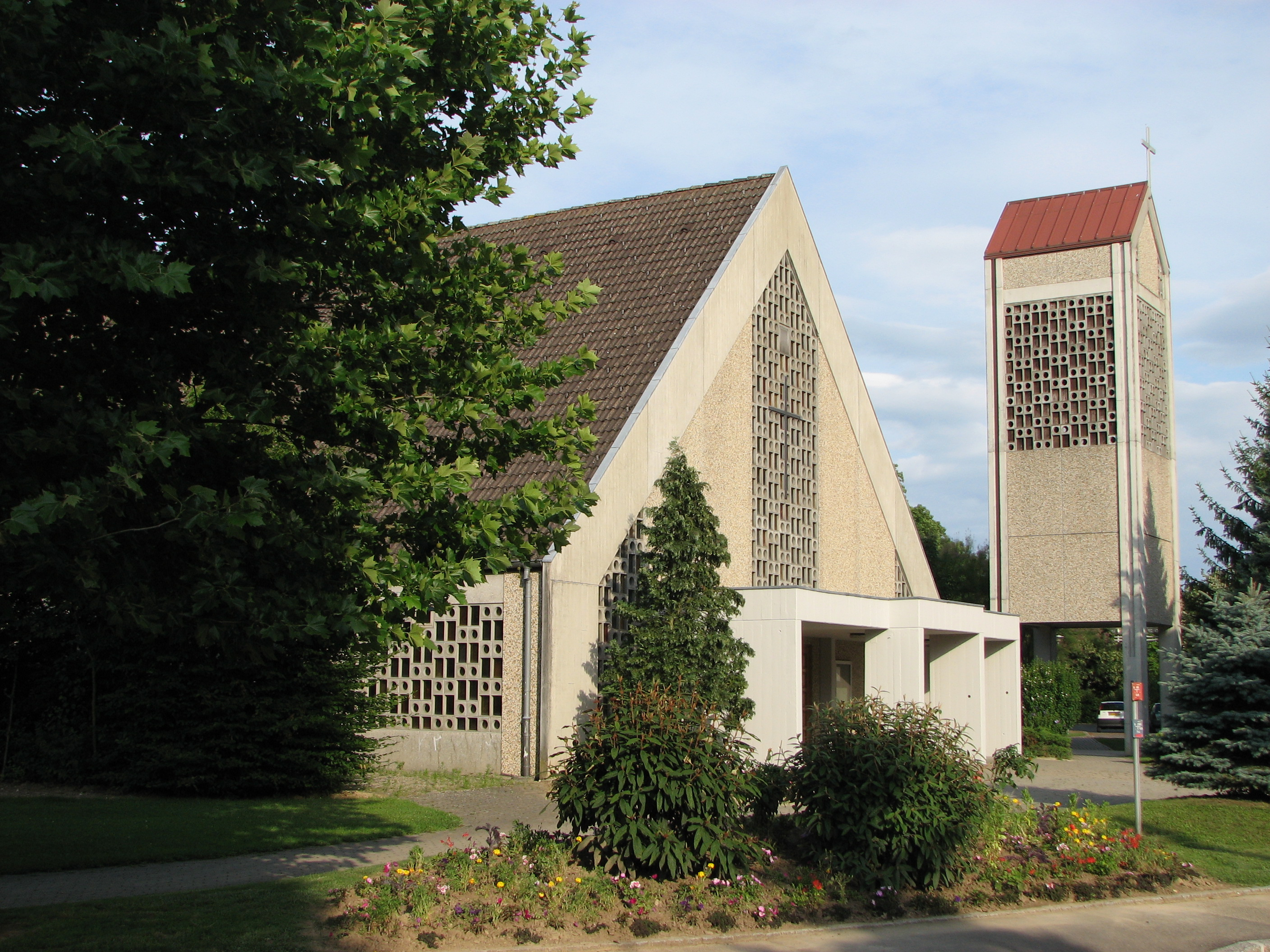 Église Saint-Jean-Baptiste de Riedisheim (68)